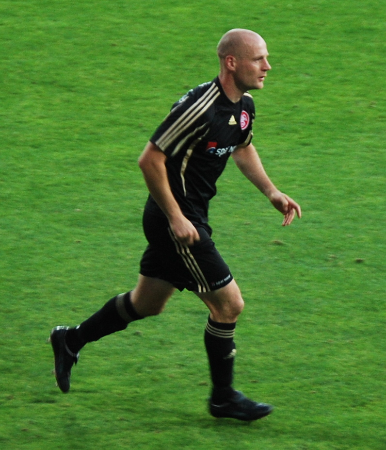 Fodboldspilleren Kasper Bøgelund fra AaB. Her i pokalkampen imellem Viborg FF og AaB på Viborg Stadion.